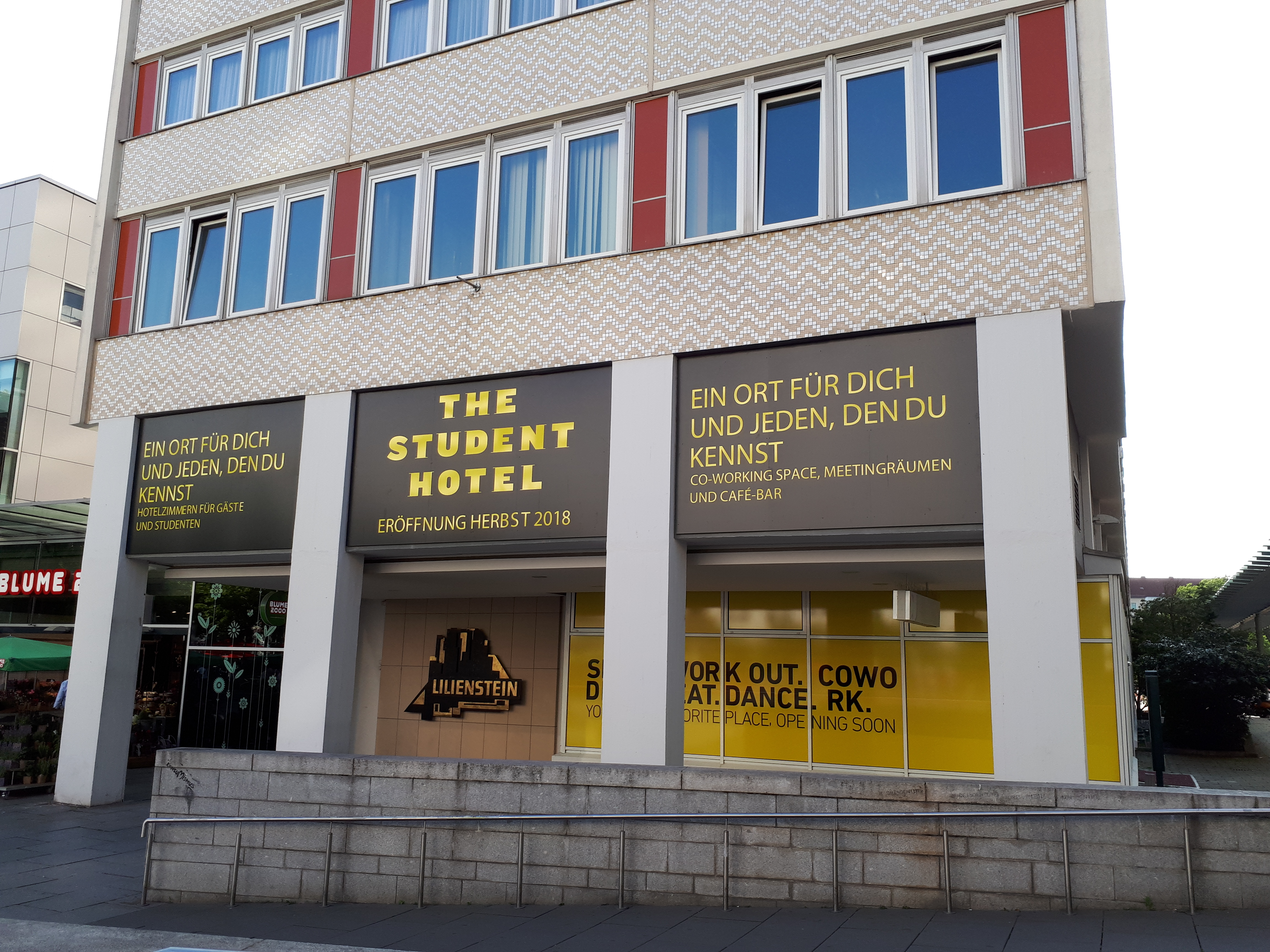 Das ehemalige Hotel Königstein des Hotel Ibis während des Umbaus zum The Student Hotel